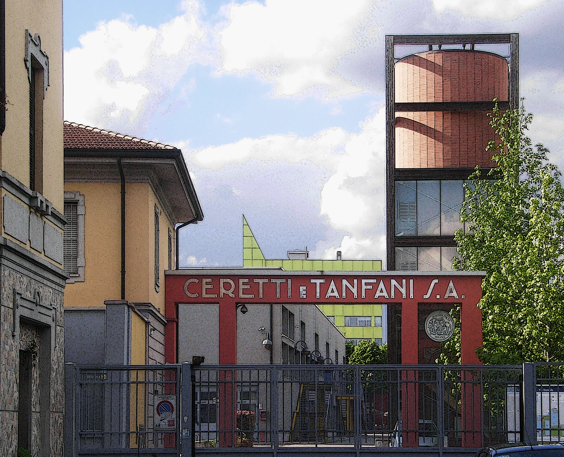 Politecnico di Milano, il campus di via Durando nel quartiere Bovisa